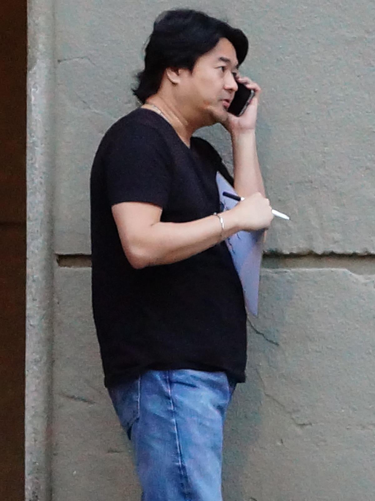 中文（台灣）: 第三屆台灣漫畫節，松山文化創意園區三號倉庫大門前，臺灣漫畫家賴有賢手持智慧型手機通話中。